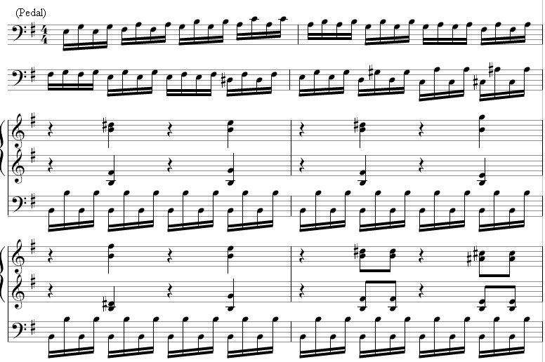 Nicolaus Bruhns, Beginn des kleinen Praeludium in e.